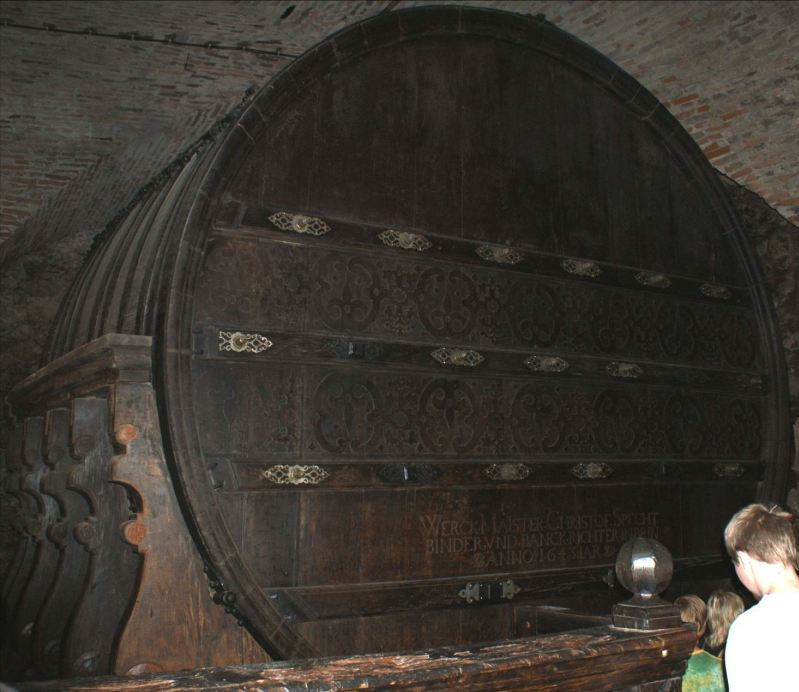 Desátkový vinný sud v Mikulově z roku 1643.